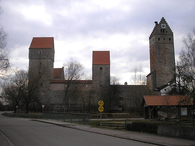 Burg Nassenfels (Landkreis Eichstätt, Oberbayern). Gesamtansicht von Norden. Eigene Aufnahme, Dez. 2006 / Nassenfels castle between Neuburg and Eichstätt (Upper Bavaria, Germany). Total view from the north. Own photo, Dec. 2006